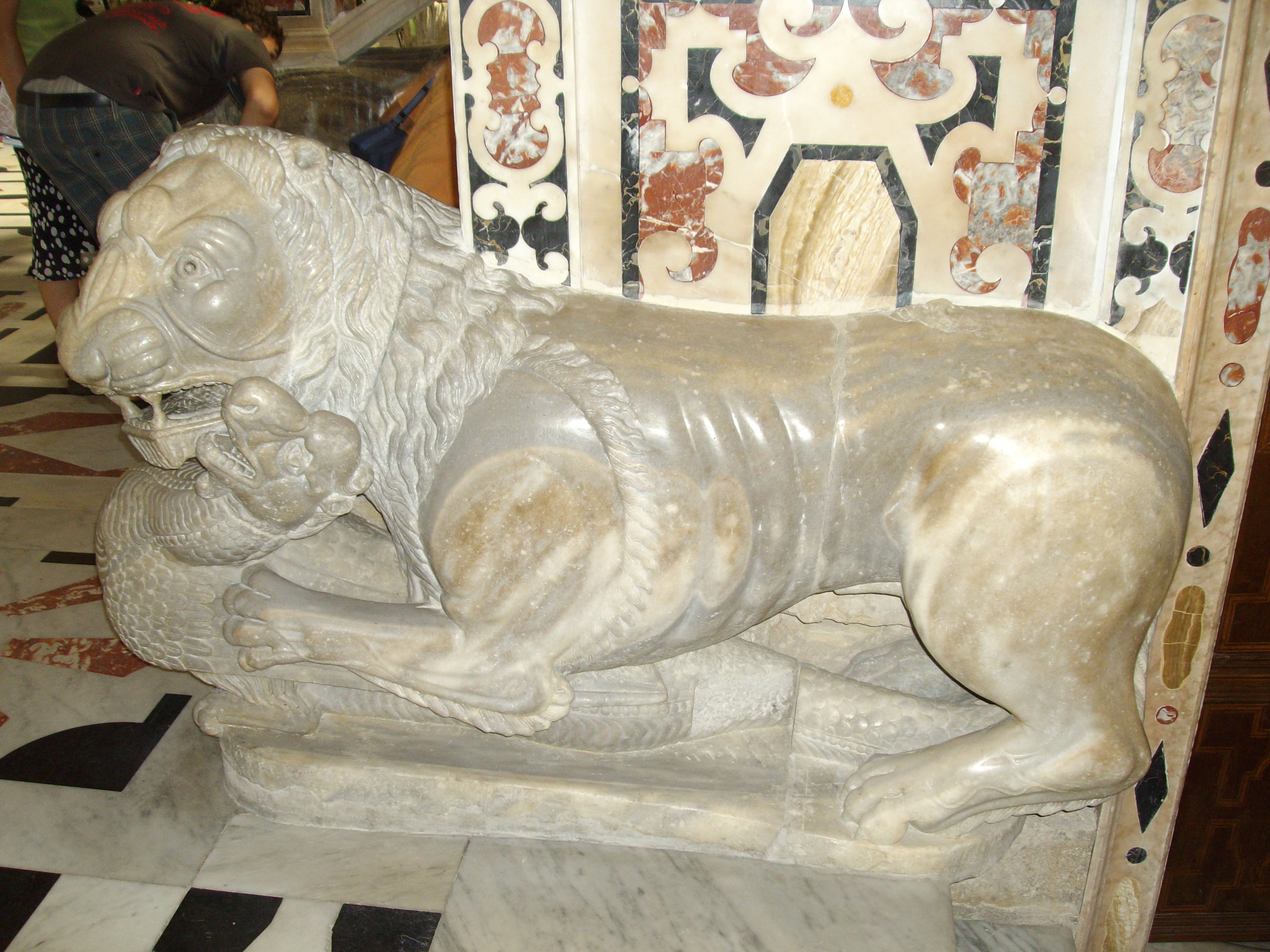 Leone stiloforo (XII secolo) - Cattedrale di Cagliari